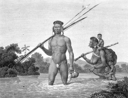 Botokudenfamilie auf der Reise